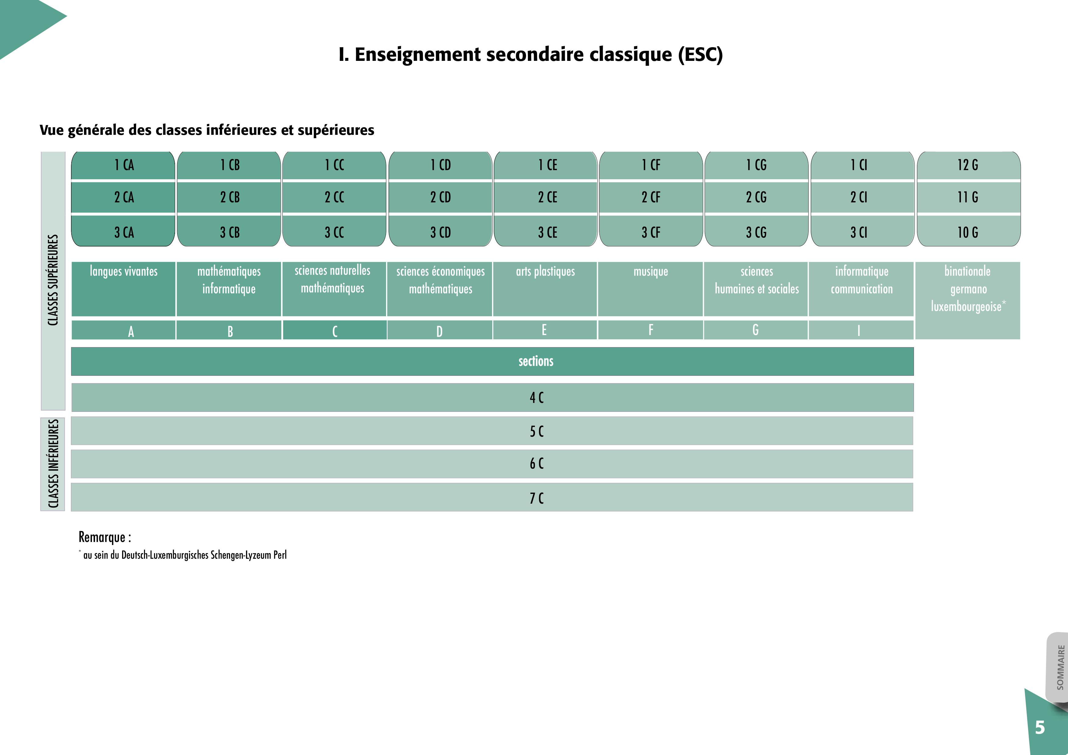 System scolaire de l'ESC (Luxembourg) à partir 2018/2019